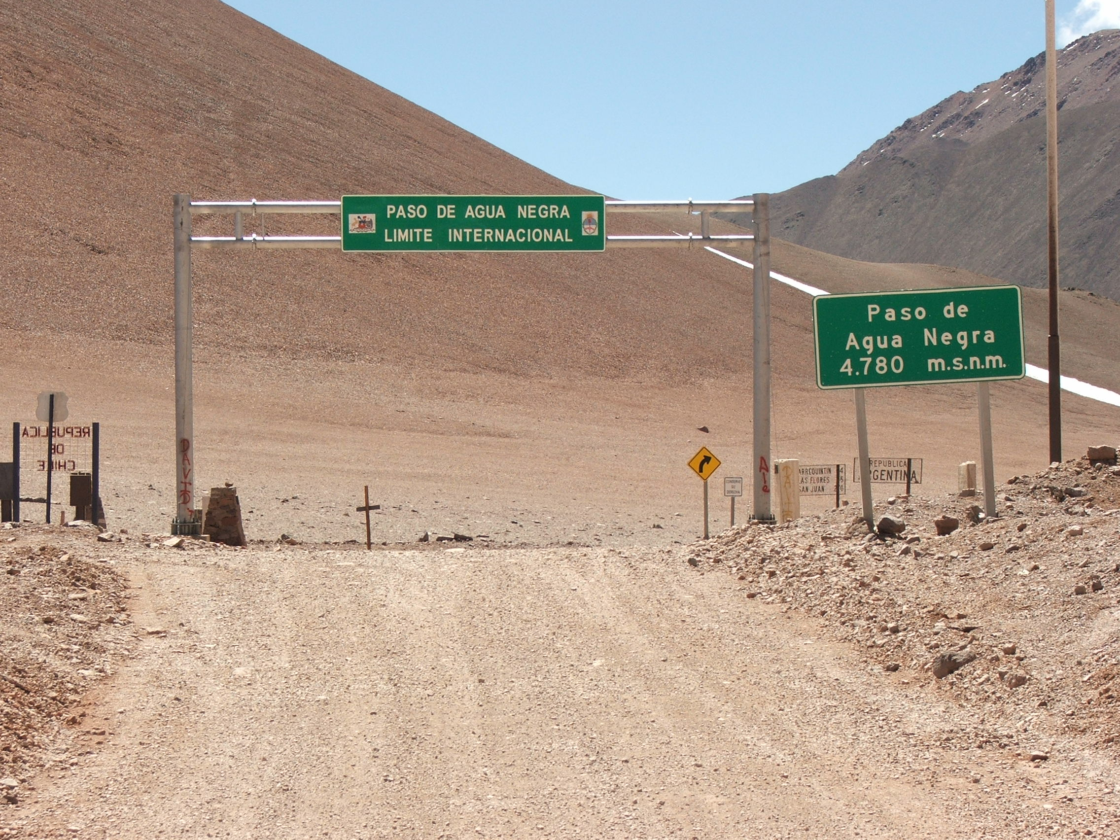 Paso de Agua Negra, en la Cordillera de los Andes, límite entre Argentina y Chile, en la provincia de San Juan.